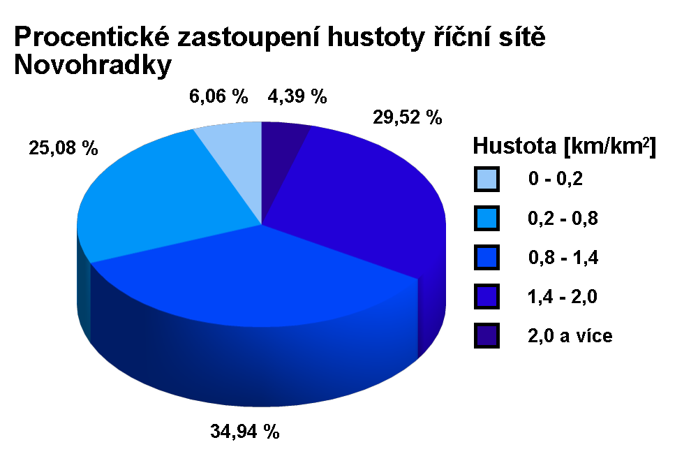 Procentické zastoupení hustoty říční sítě Novohradky